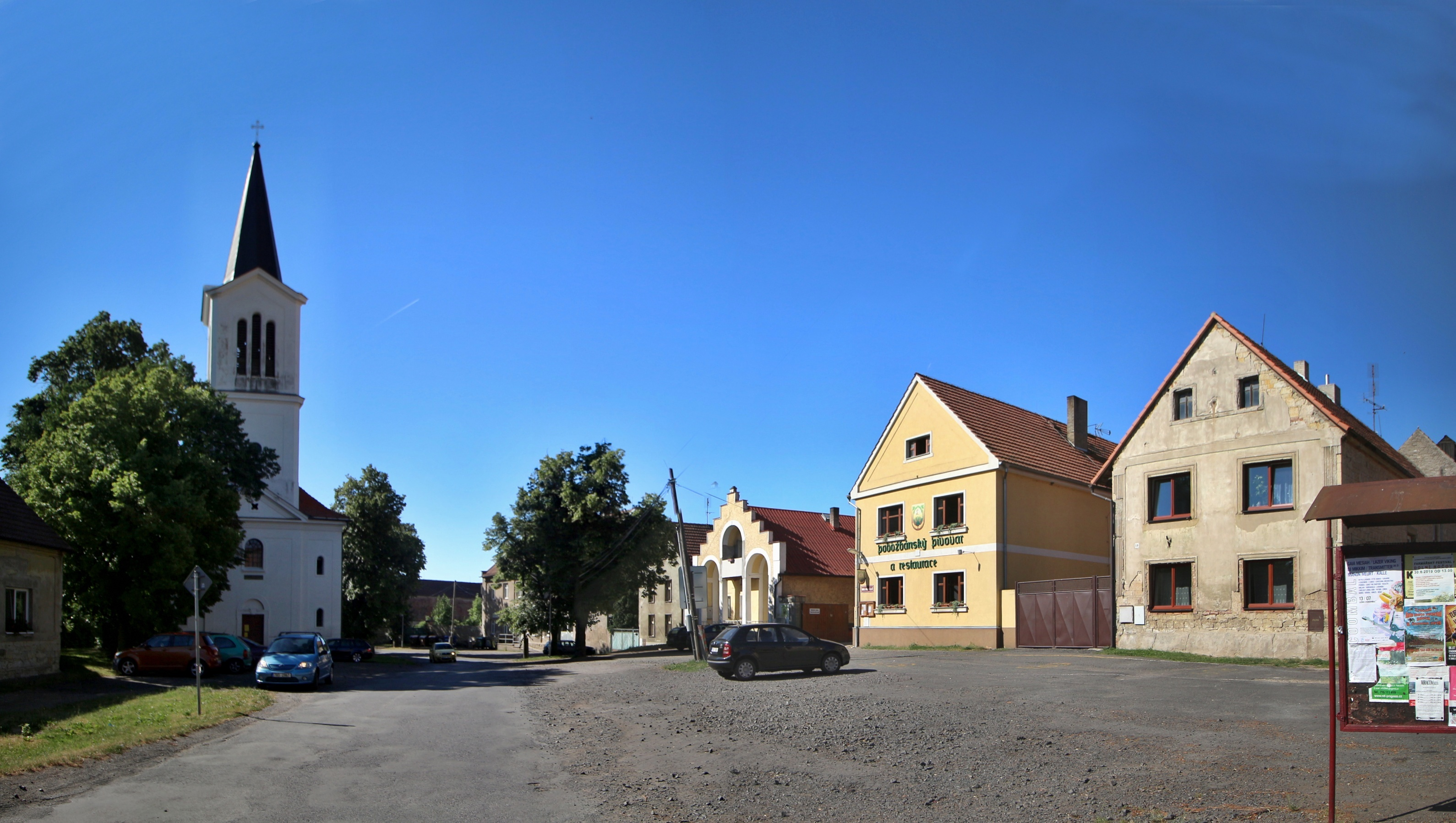 Mutějovice